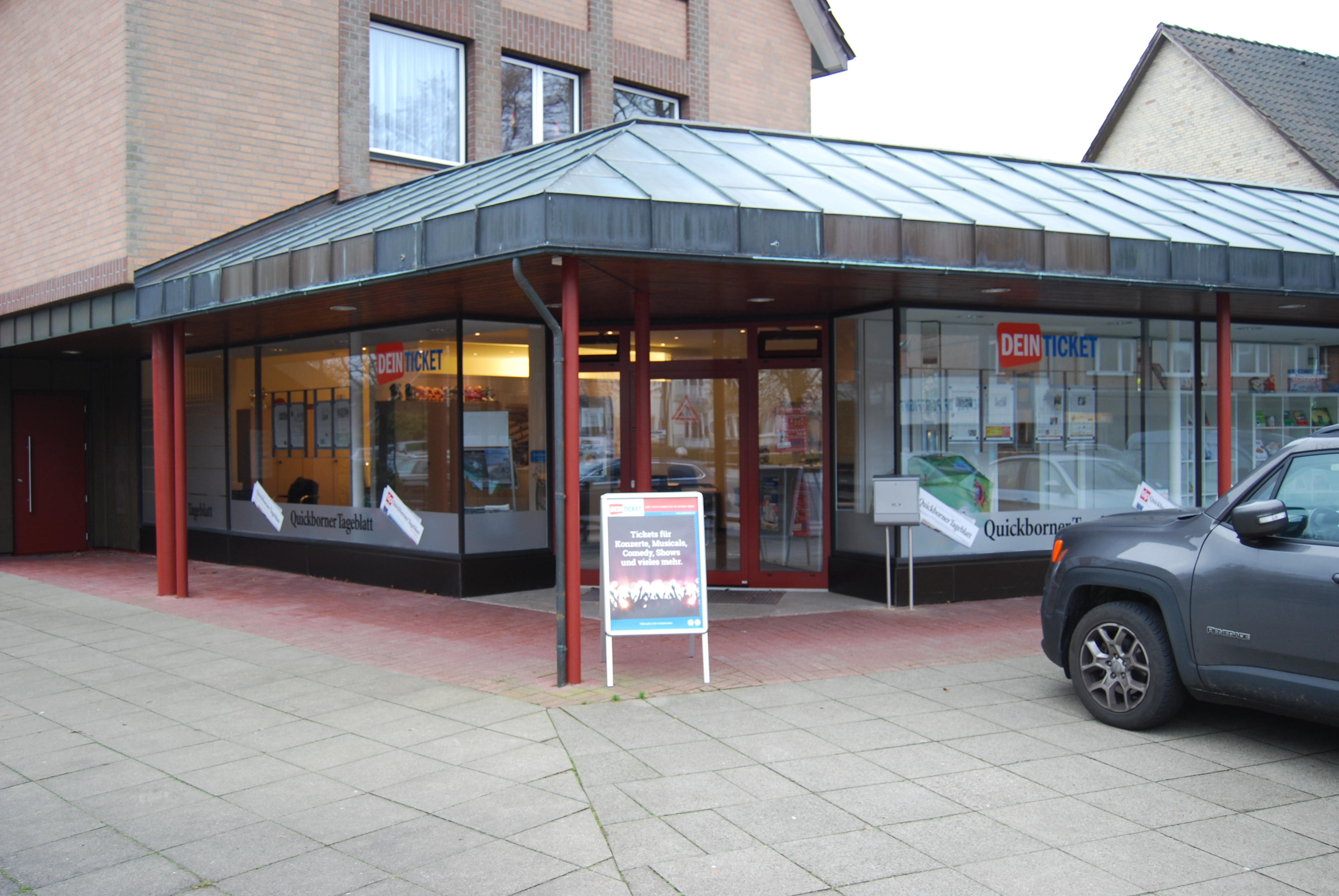 Geschäftsstelle des Quickborner Tageblatt